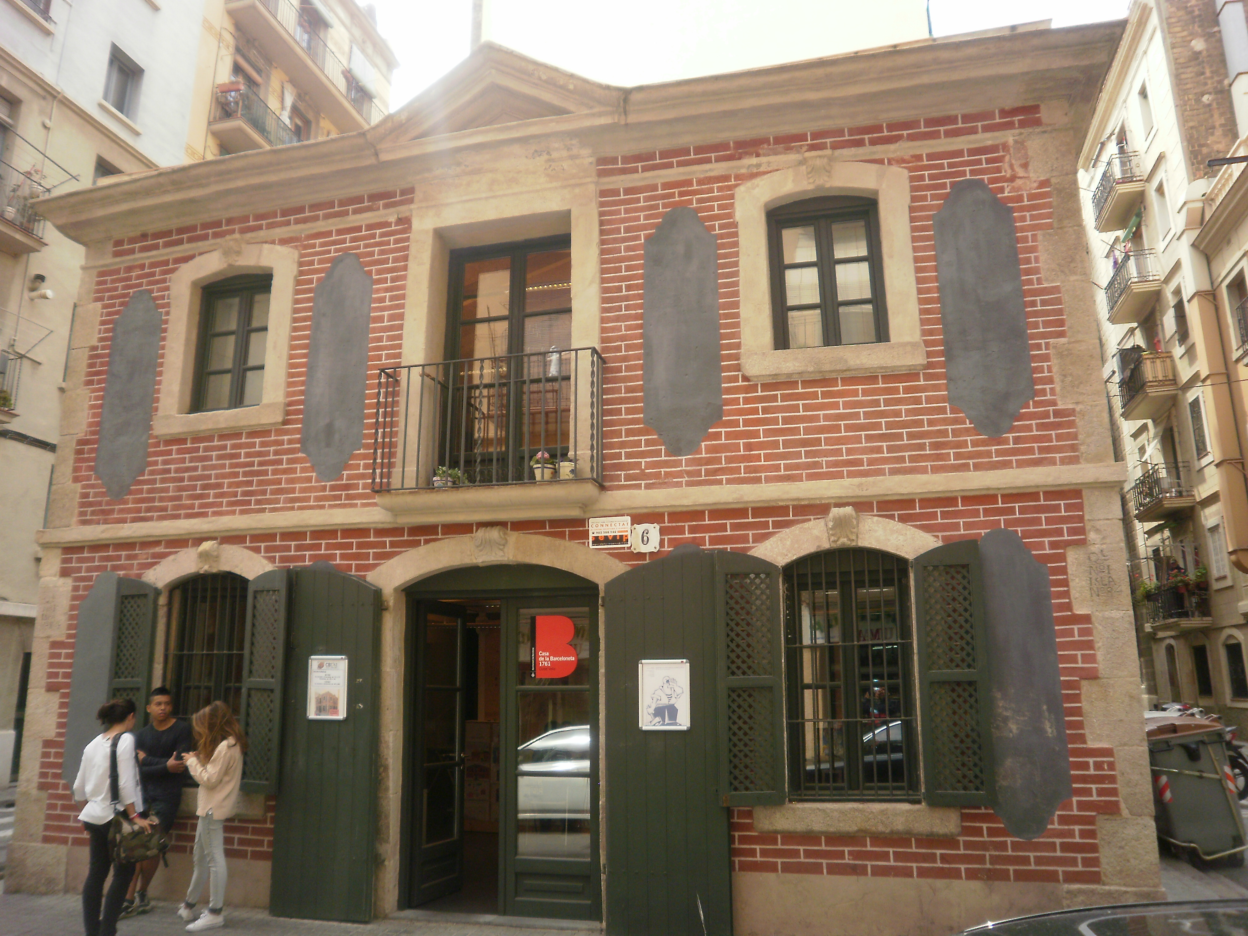 Casa de la Barceloneta (1761), centre cultural al carrer de Sant Carles, 6, Barcelona. Coneguda popularment com a Casa del Porró.